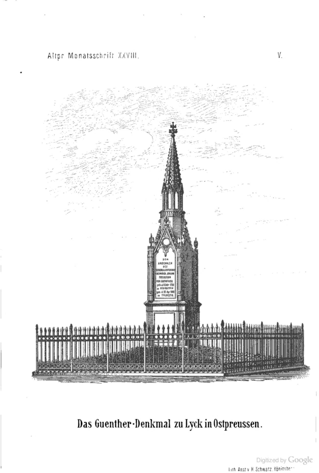 Denkmal für den Generalleutnant Johann Heinrich von Günther (1736–1803), errichtet 1840/41 in Lyck auf Betreiben von Johann Samuel Rosenheyn.